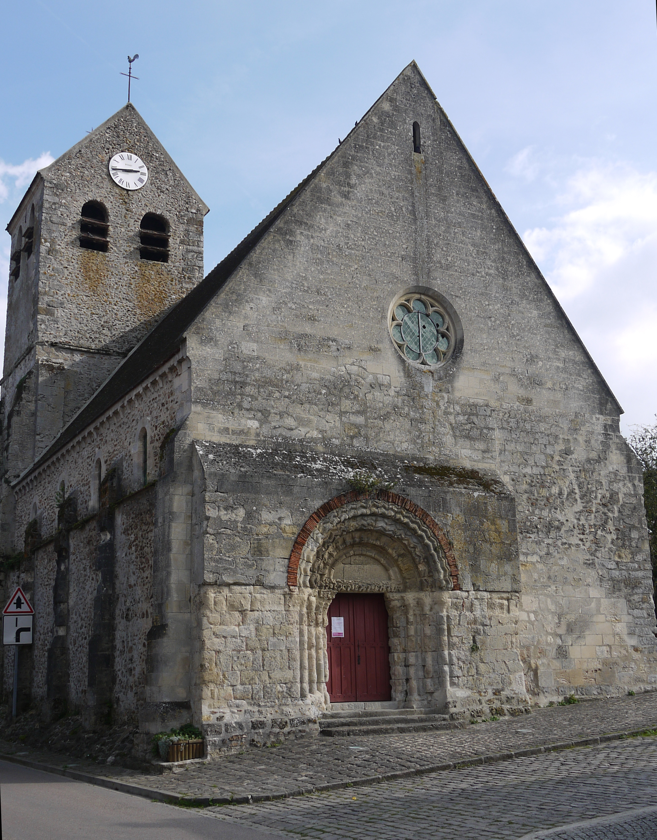 Église Saint-Médard d'Epaux-Bézu